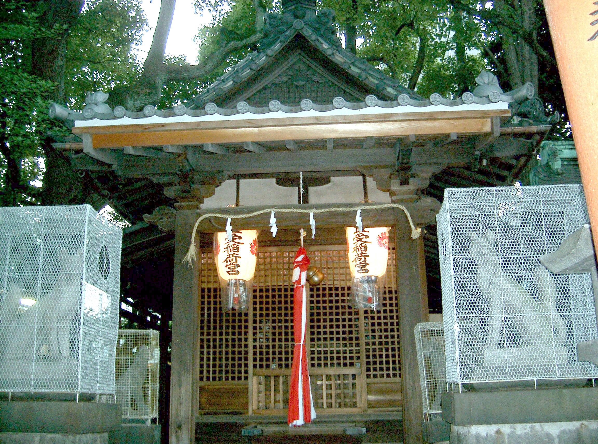 野田恵美須神社 稲荷宮